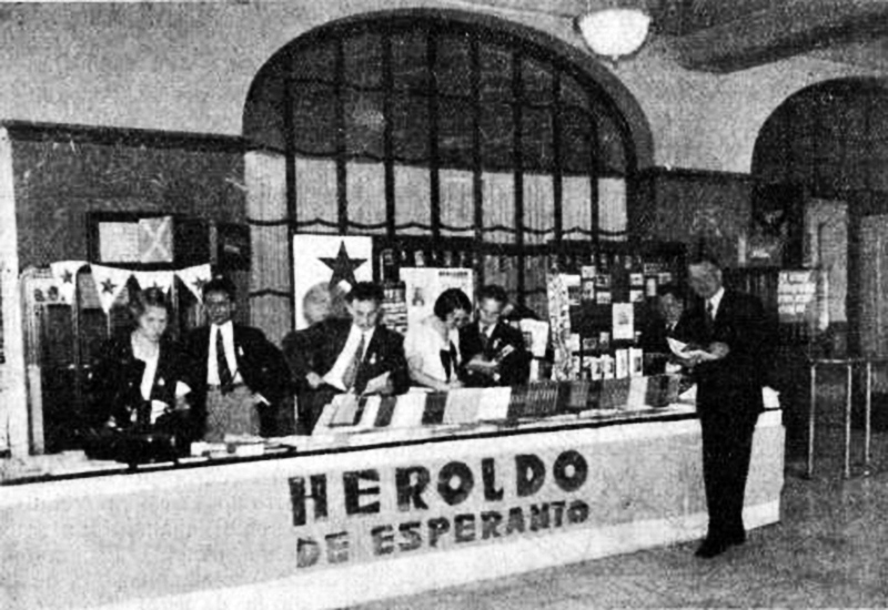 Stando de Heroldo de Esperanto dum la UK en Kolonjo, 1933